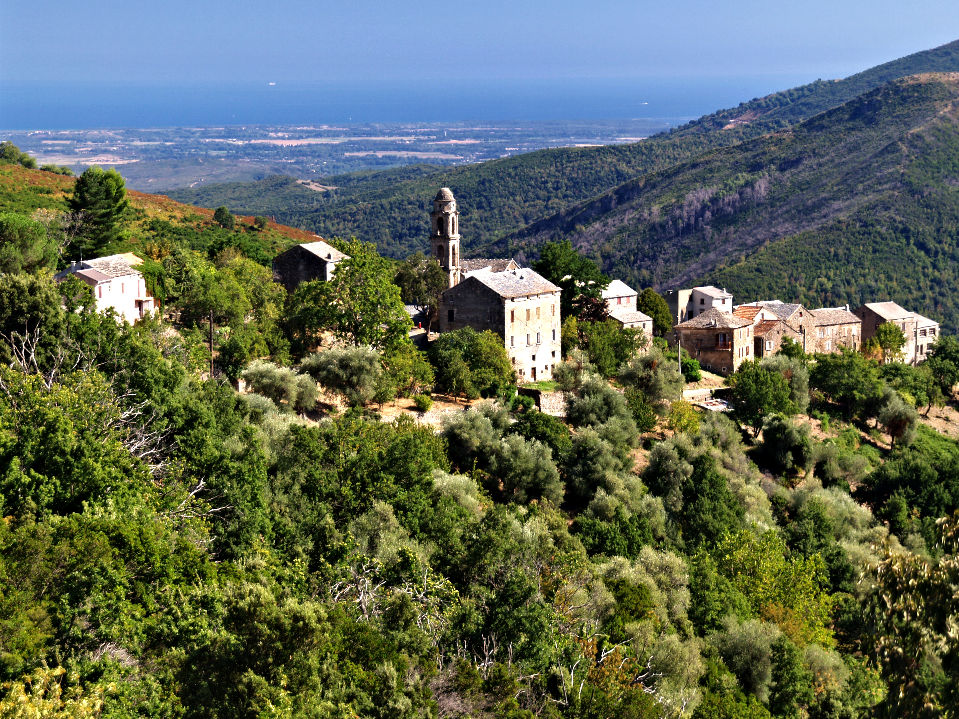 Ampriani (Corsica) - Vue du village et de la plaine d'Aléria